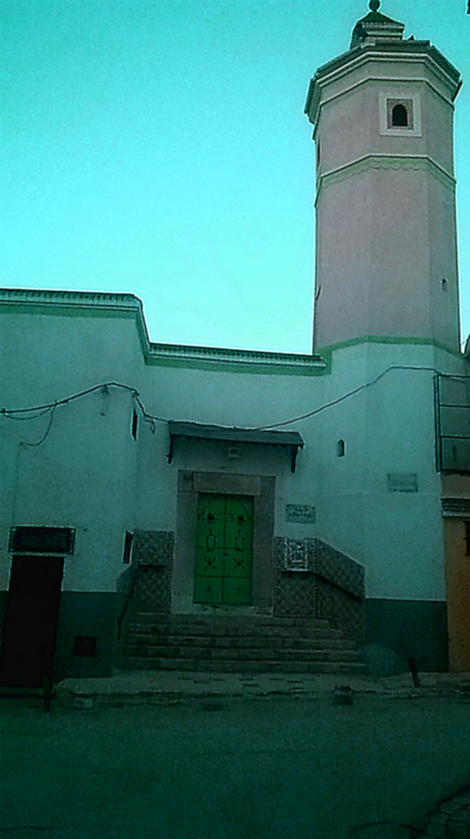 La médina de Tunis مدينة تونس العتيقة